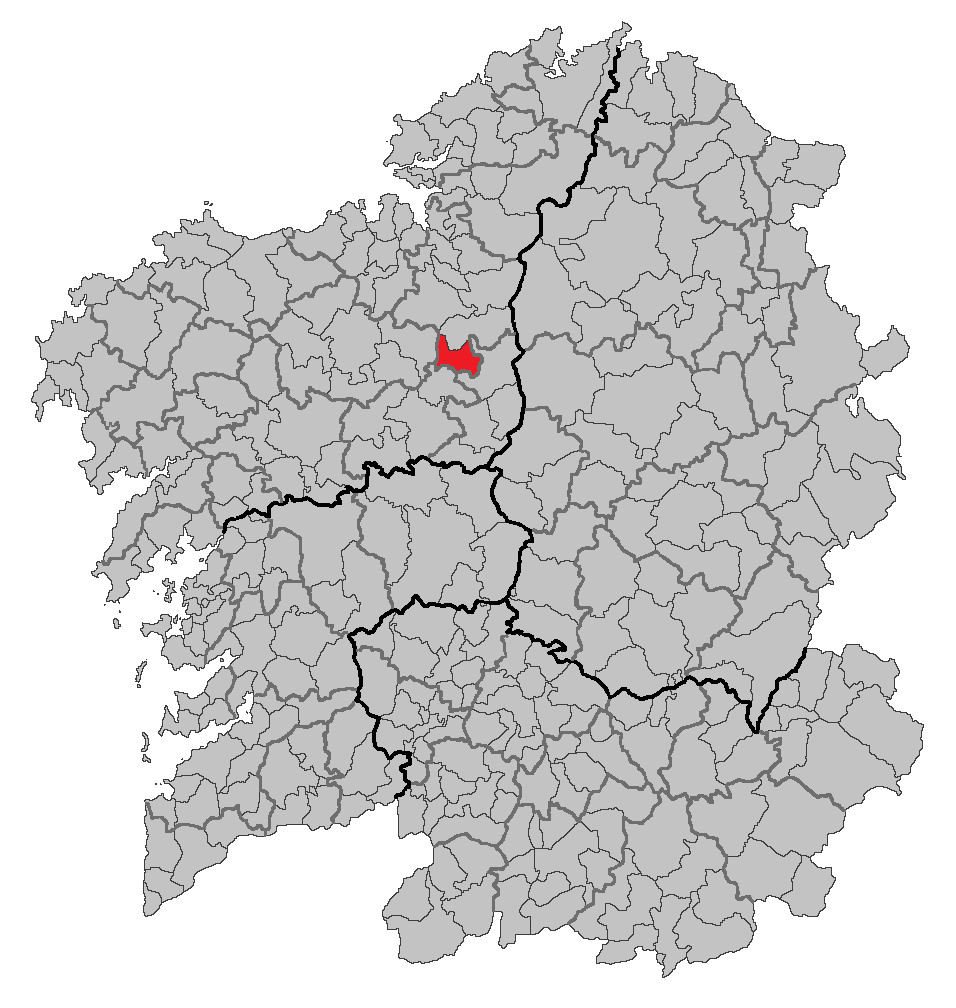 Mapa coa localización do concello de Vilasantar.